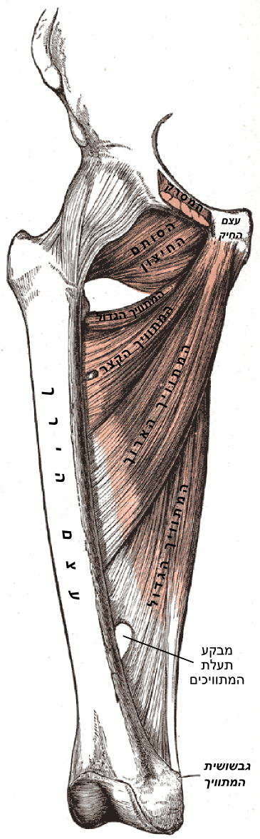 . מבט קדמי על שרירים מתוויכים בירך ימין